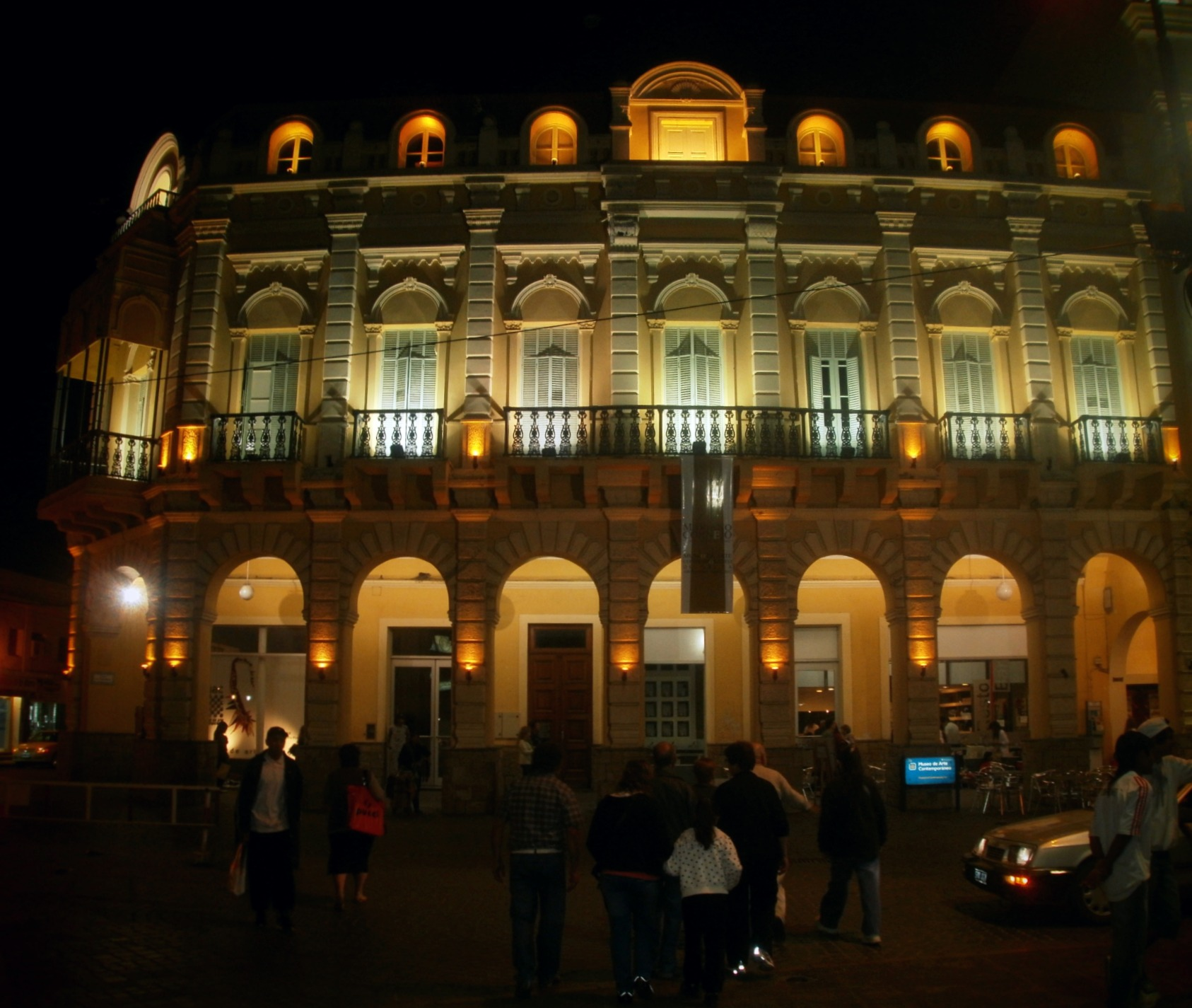 MAC es un eficio de estilo italiano que data del siglo XIX, ubicado en el casco histórico. Con cuatro años de vida el museo ha logrado una fuerte inserción a nivel nacional e internacional gracias al apoyo sostenido de la comunidad que con su participación constante ha colaborado al logro de los principales objetivos